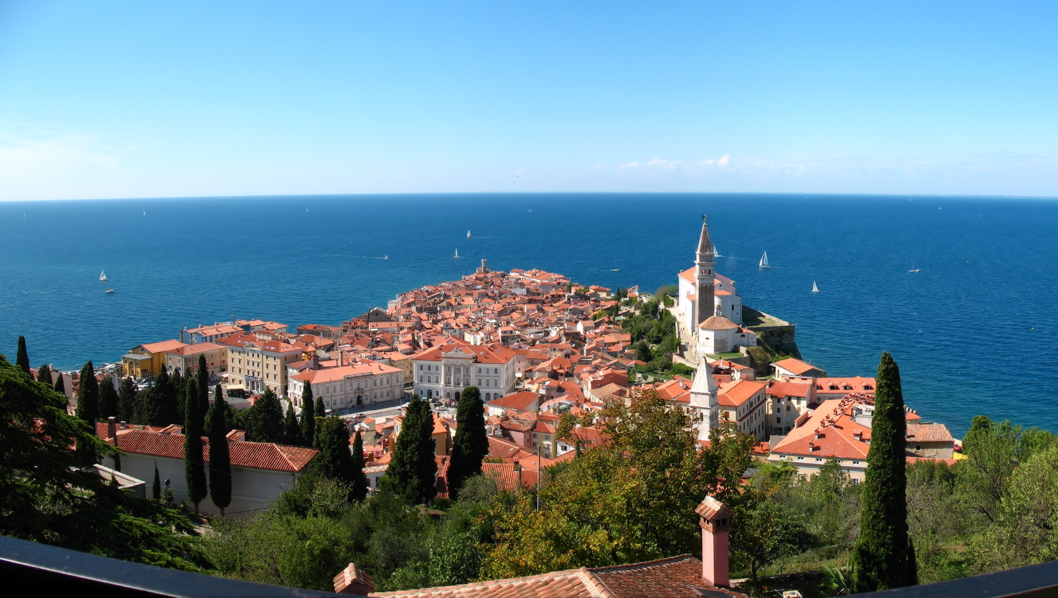 Piran (Panoramabild von der Stadtmauer) Vorne rechts: Sankt Georg (Sv. Jurij), Mitte hinten: San Clemente (Sv. Klementa); Mitte vorne: Tartini-Platz